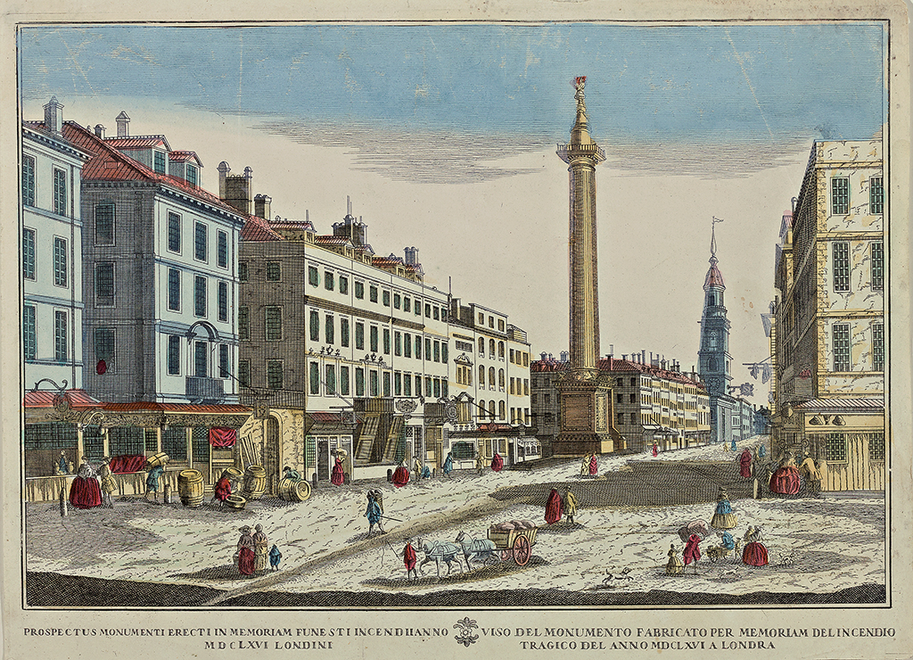 Viso del Monumento Fabricato Per Memoriam Delincendio Tragico Del Anno MDCLXVI A Londra Monument an der Fish Street. Kolorierter Kupferstich, um 1750. Platte 28,5 x 42 cm